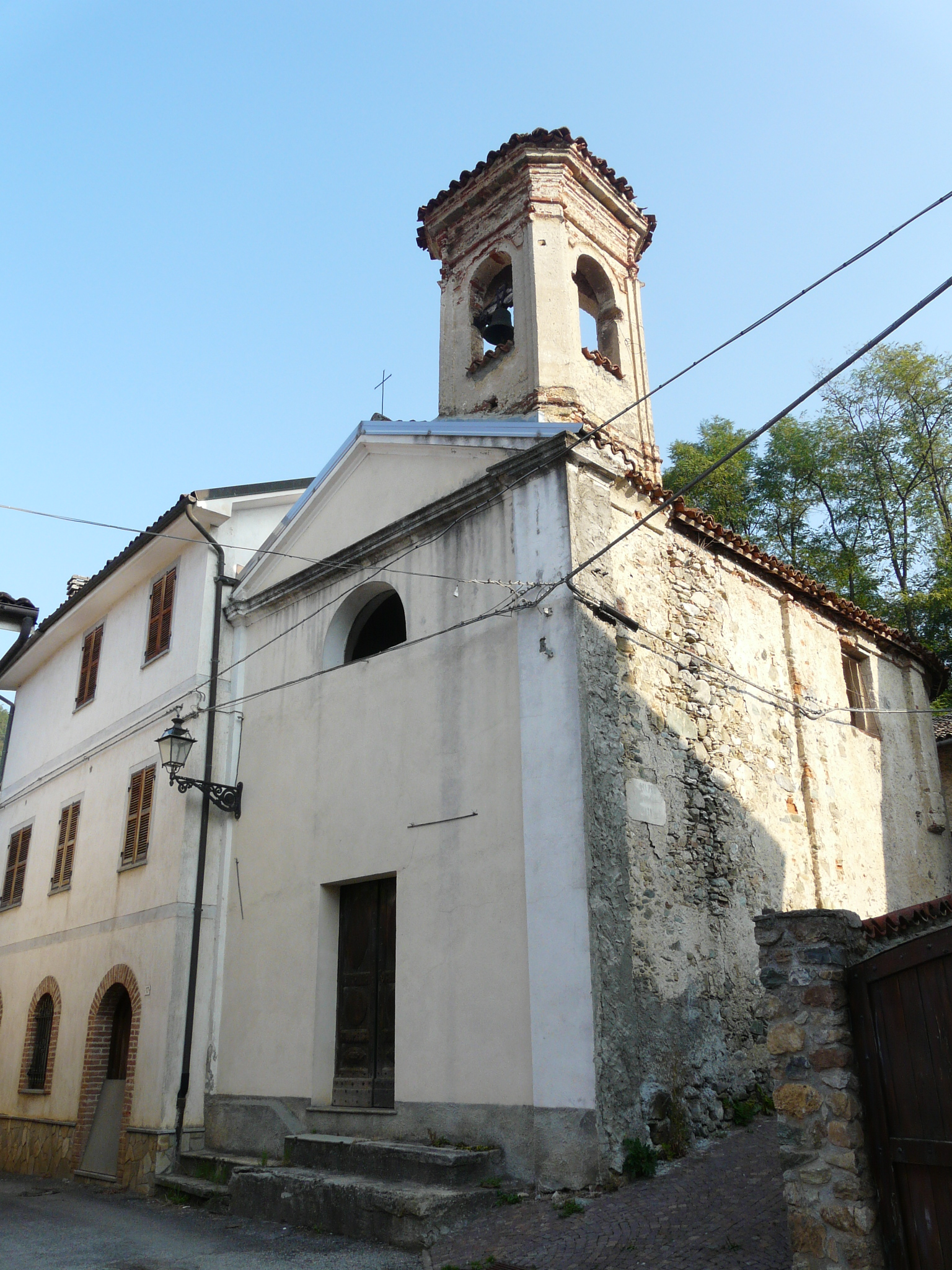 Oratorio di San Vincenzo Ferreri, Massimino, Liguria, Italia